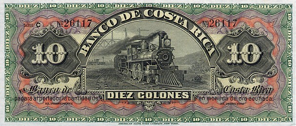 10 колонов (обр. 1901-1908). Коста-Рика. Аверс. Паровоз.